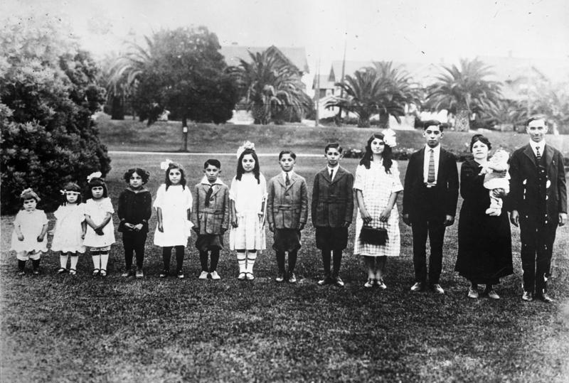 Kindersegen in Amerika ! Gruppenaufnahme der kinderreichen Familie in Los Angelos mit ihren 12 Kindern. Das jüngste auf dem Arm der Mutter ist erst ein halbes Jahr alt. Ganz rechts das Familien-Oberhaupt.